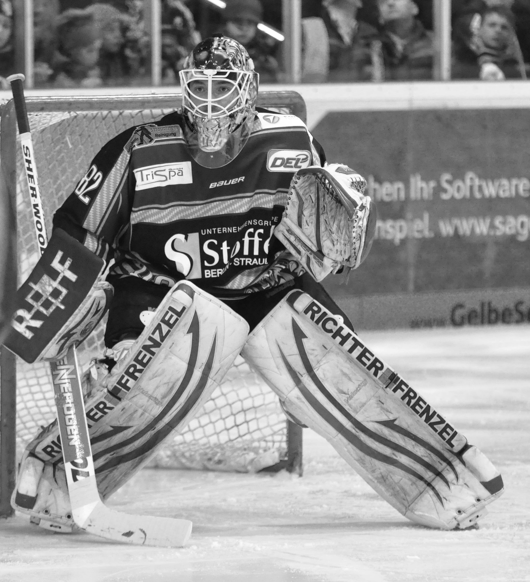 Straubing Tigers - Hamburg Freezers 26.02.2012, DEL Deutsche Eishockey Liga